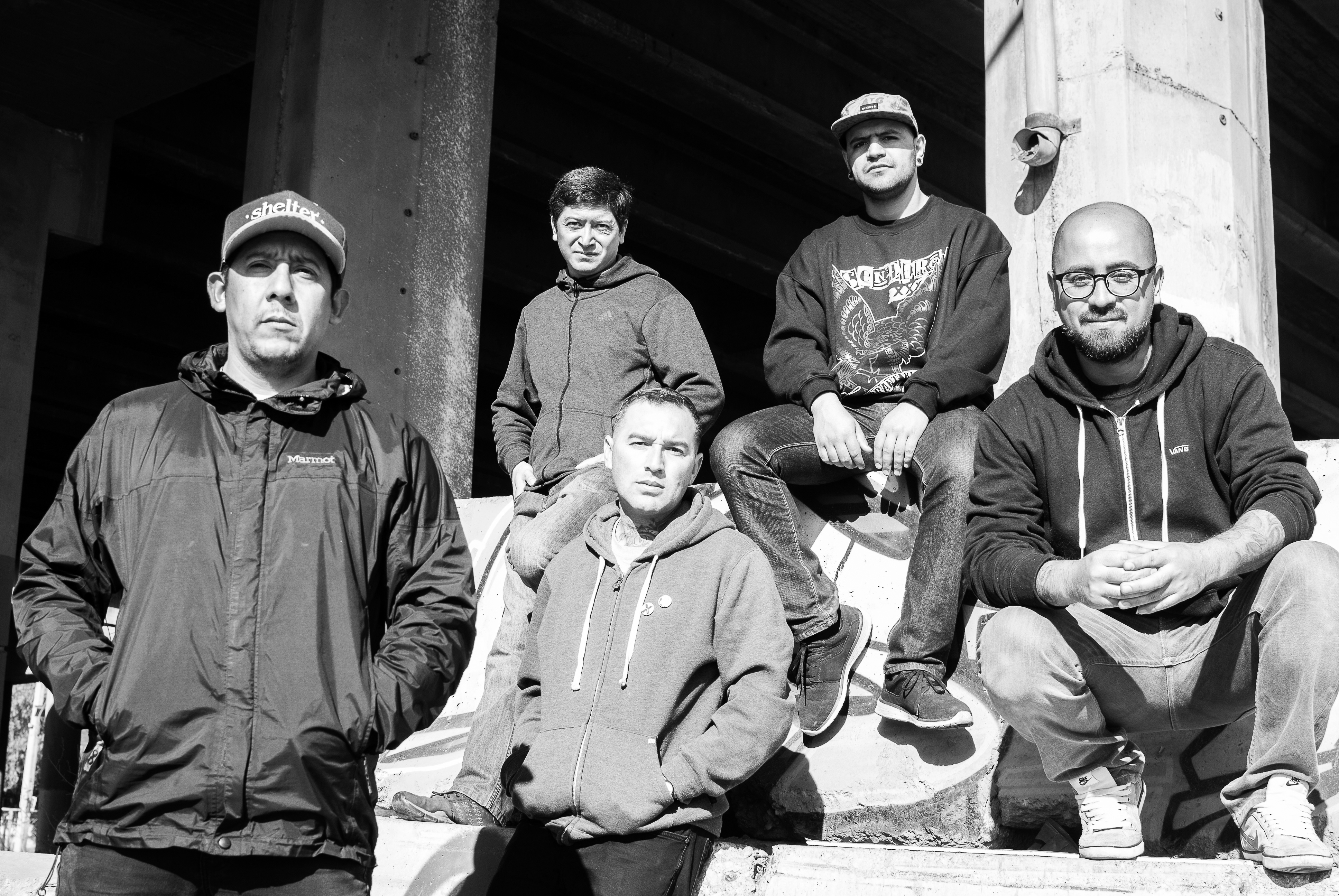 Común y Corriente en la actualidad, de izquierda a derecha: Esteban Gonzalez, Jonathan Bettancourt, Patricio casanova, Claudio Hernandez y Marcos Hinojosa.